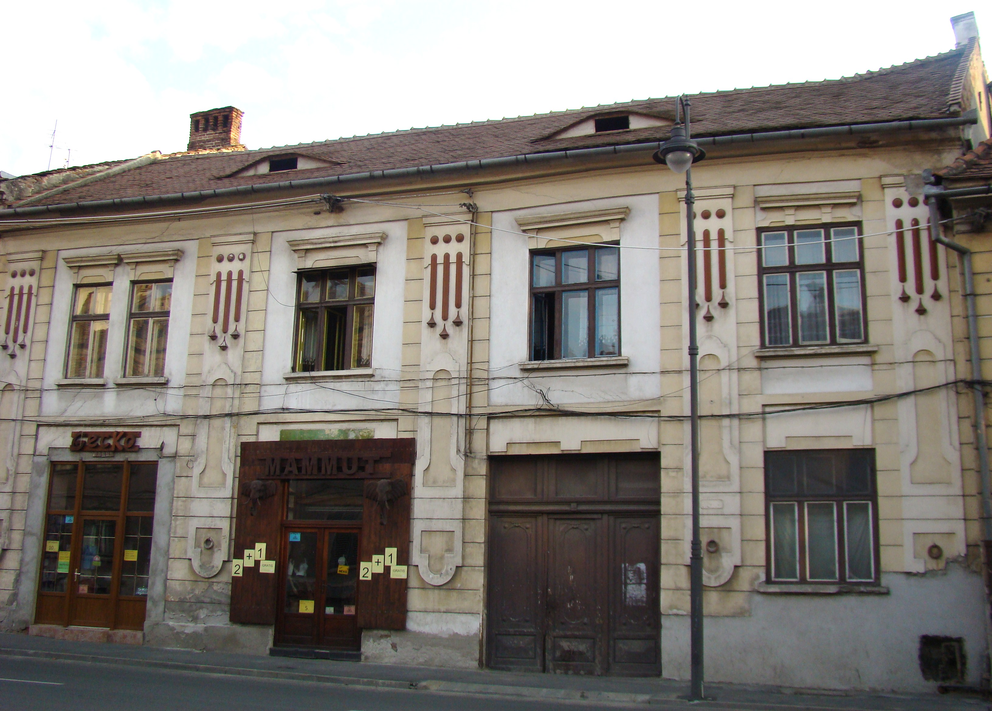 Clădire monument istoric, str.Andrei Șaguna, nr.3